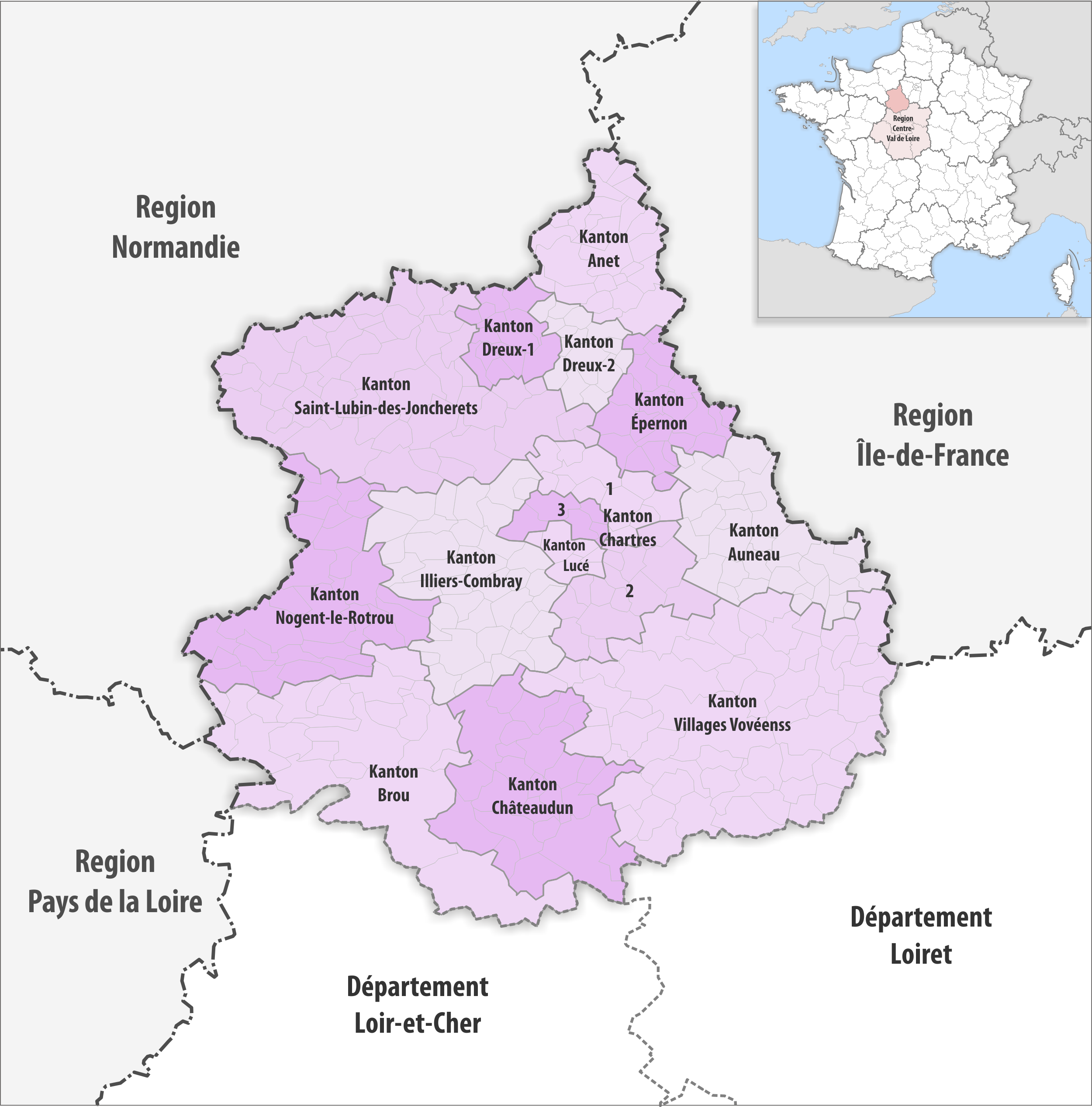 Gemeinden und Kantone im Departement Eure-et-Loir